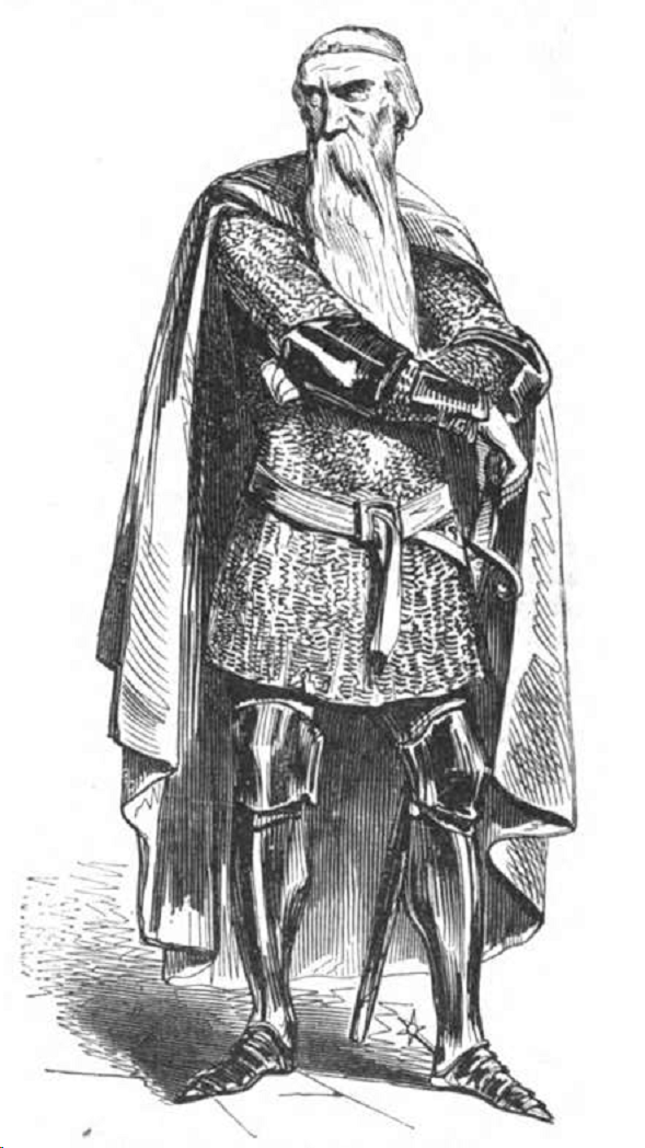 Pierre-François Beauvallet in der Rolle des Hiob.